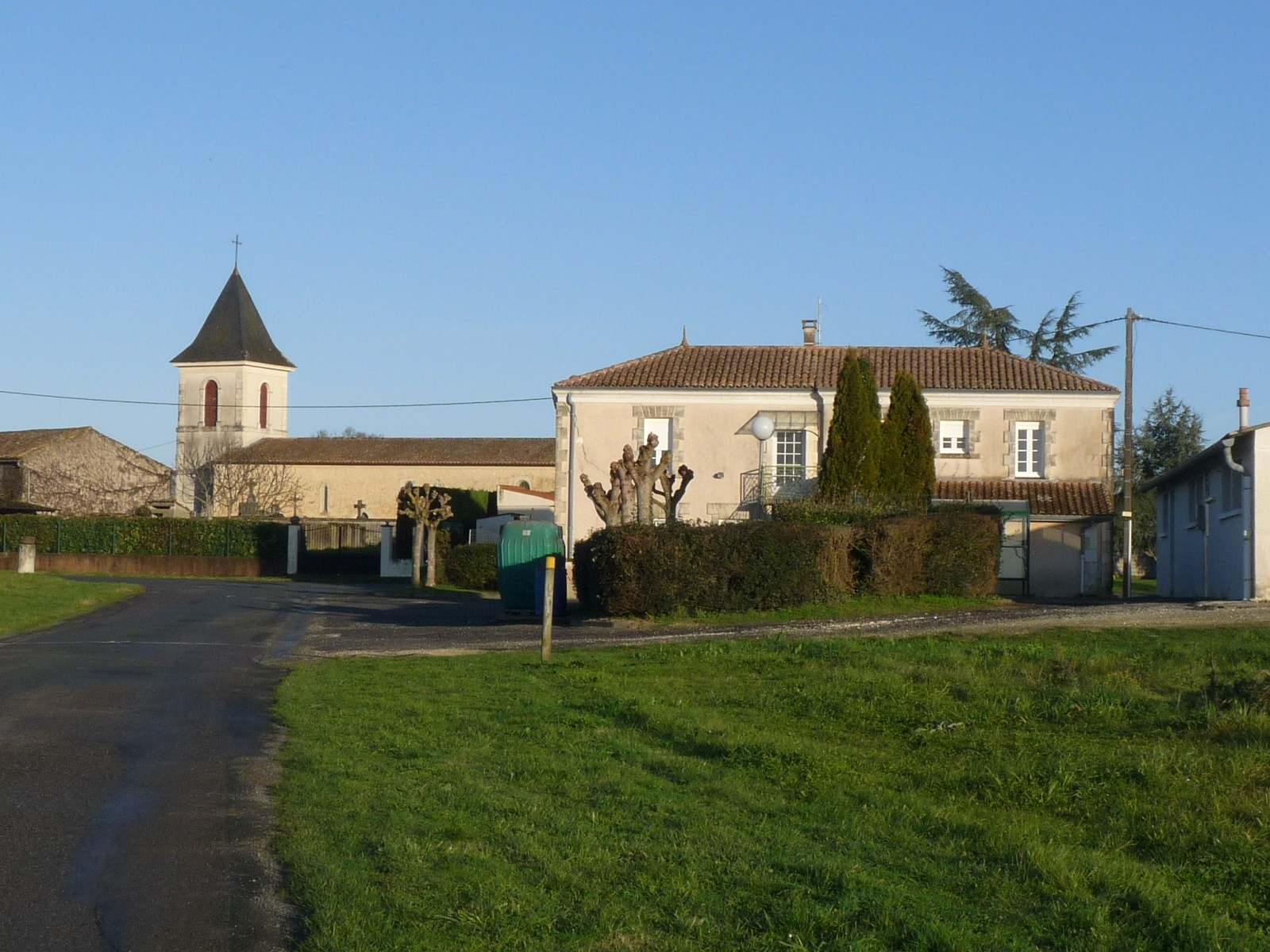 Coux, Charente-Maritime, France